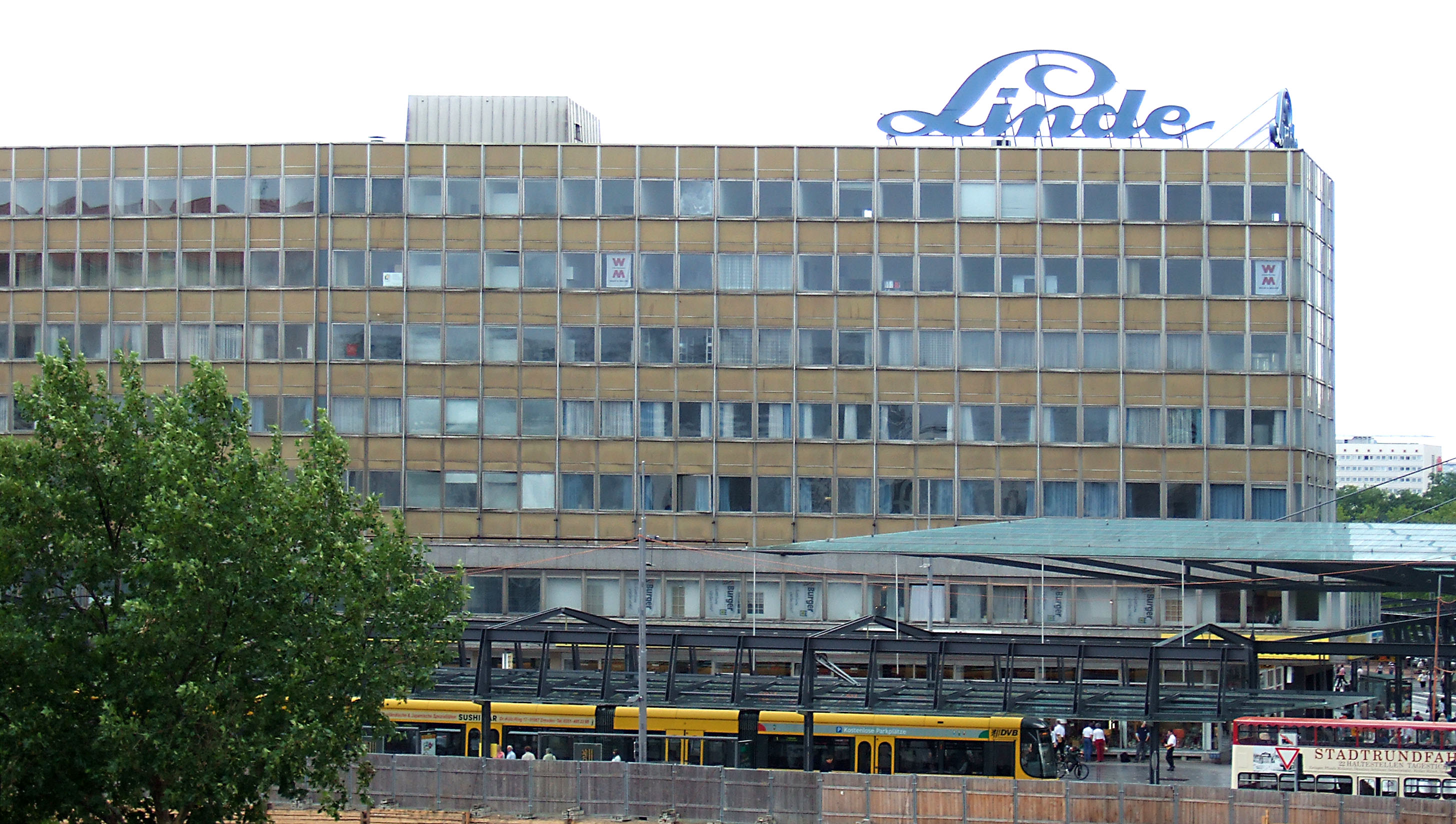 Ehemaliges Lindehaus (ehemals Haus des Buches) an der Wilsdruffer Straße in Dresden Im Jahr 2009 abgerissen für die Erweiterung der Altmarkt-Galerie